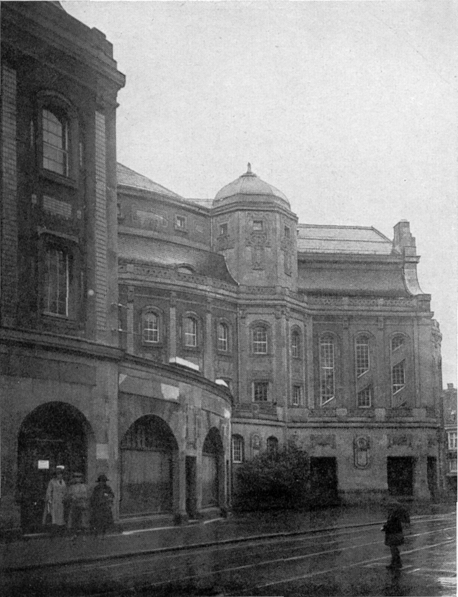 Stadttheater Barmen (Opernhaus) nach der Fertigstellung 1905